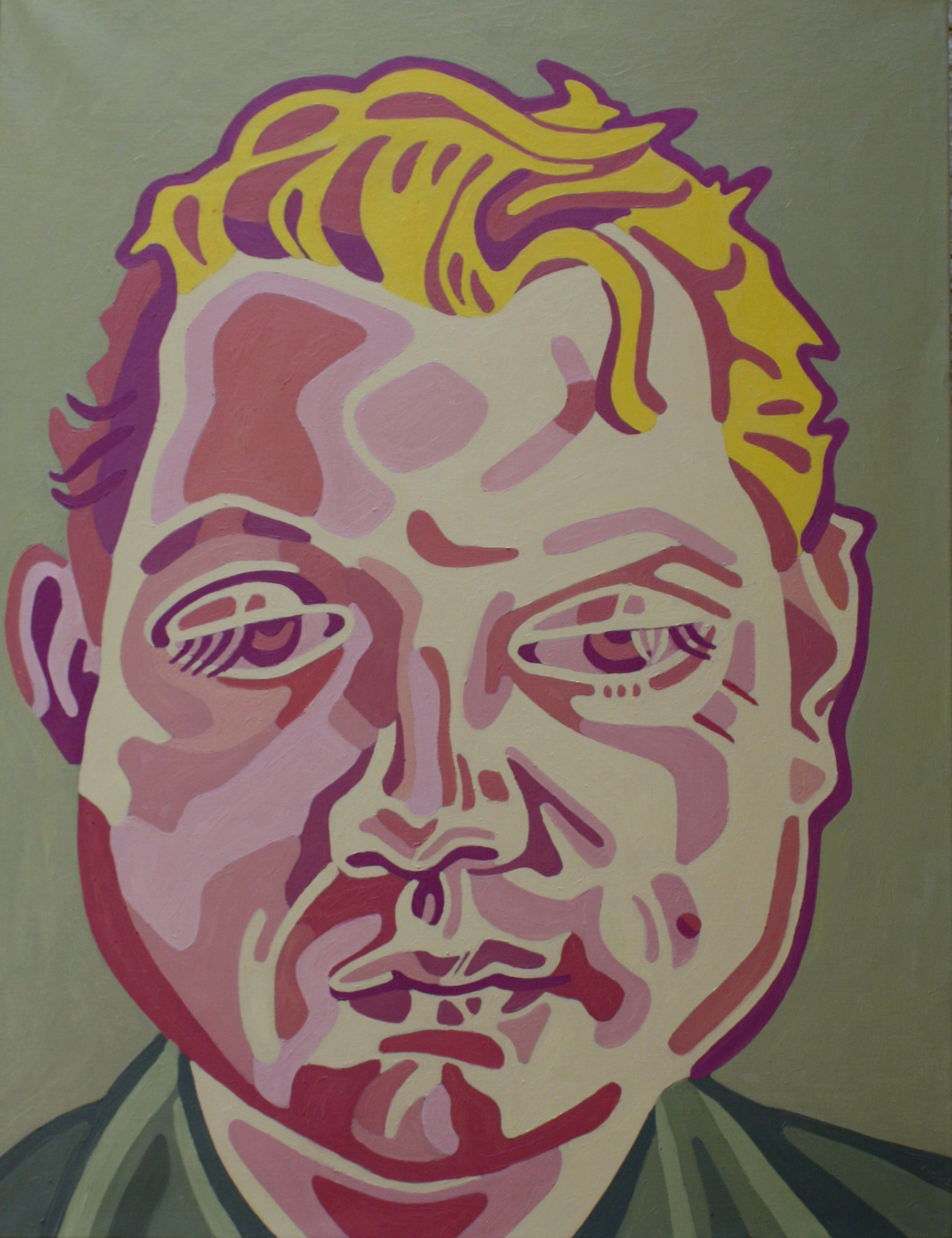 Nomi Tannhauser, Francis Bacon (after Freud)